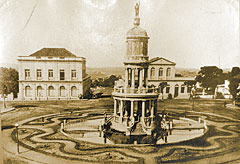 Foto do Château d'Eau, na década de 20